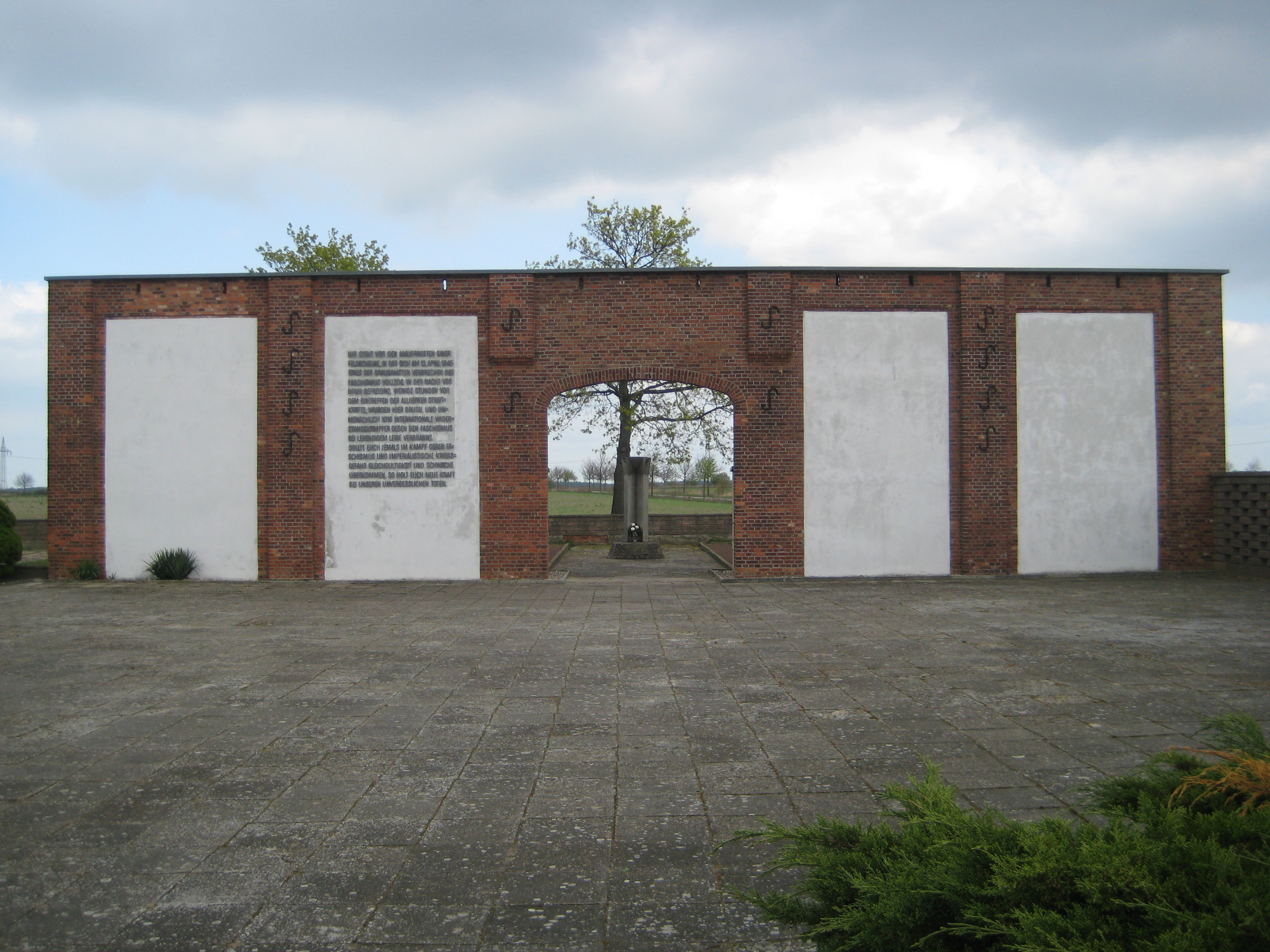 Ansicht der bestehende Feldscheunenmauer